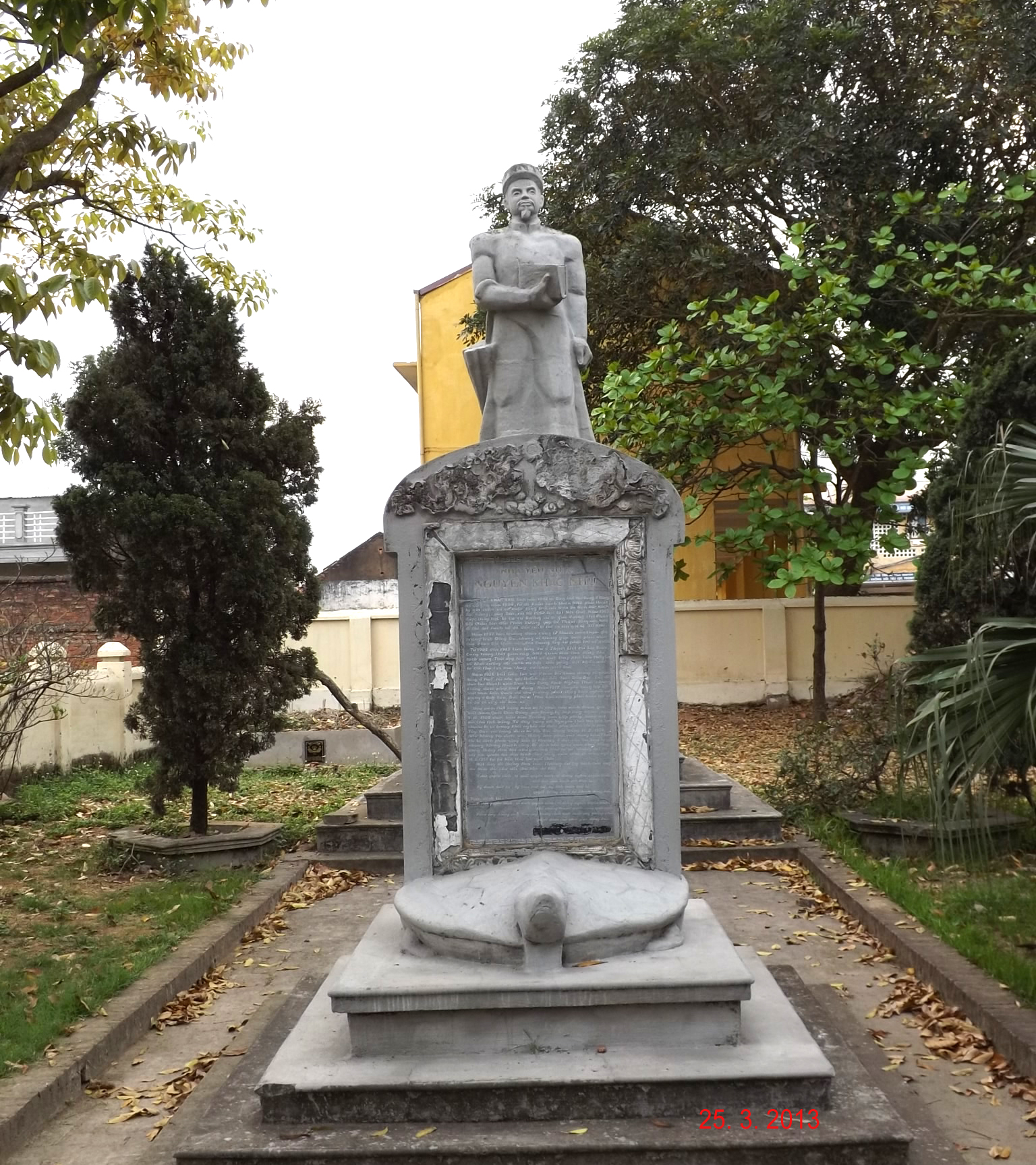 Tượng đài chí sĩ Nguyễn Khắc Nhu.